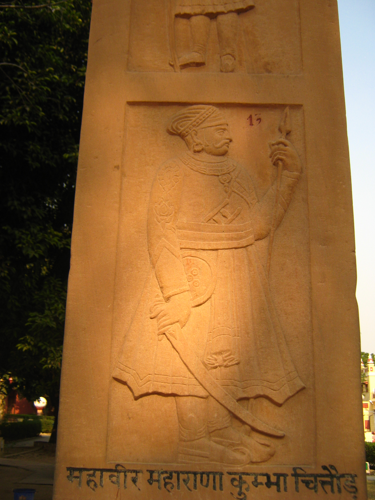 बिरला मंदिर, दिल्ली में एक शैल चित